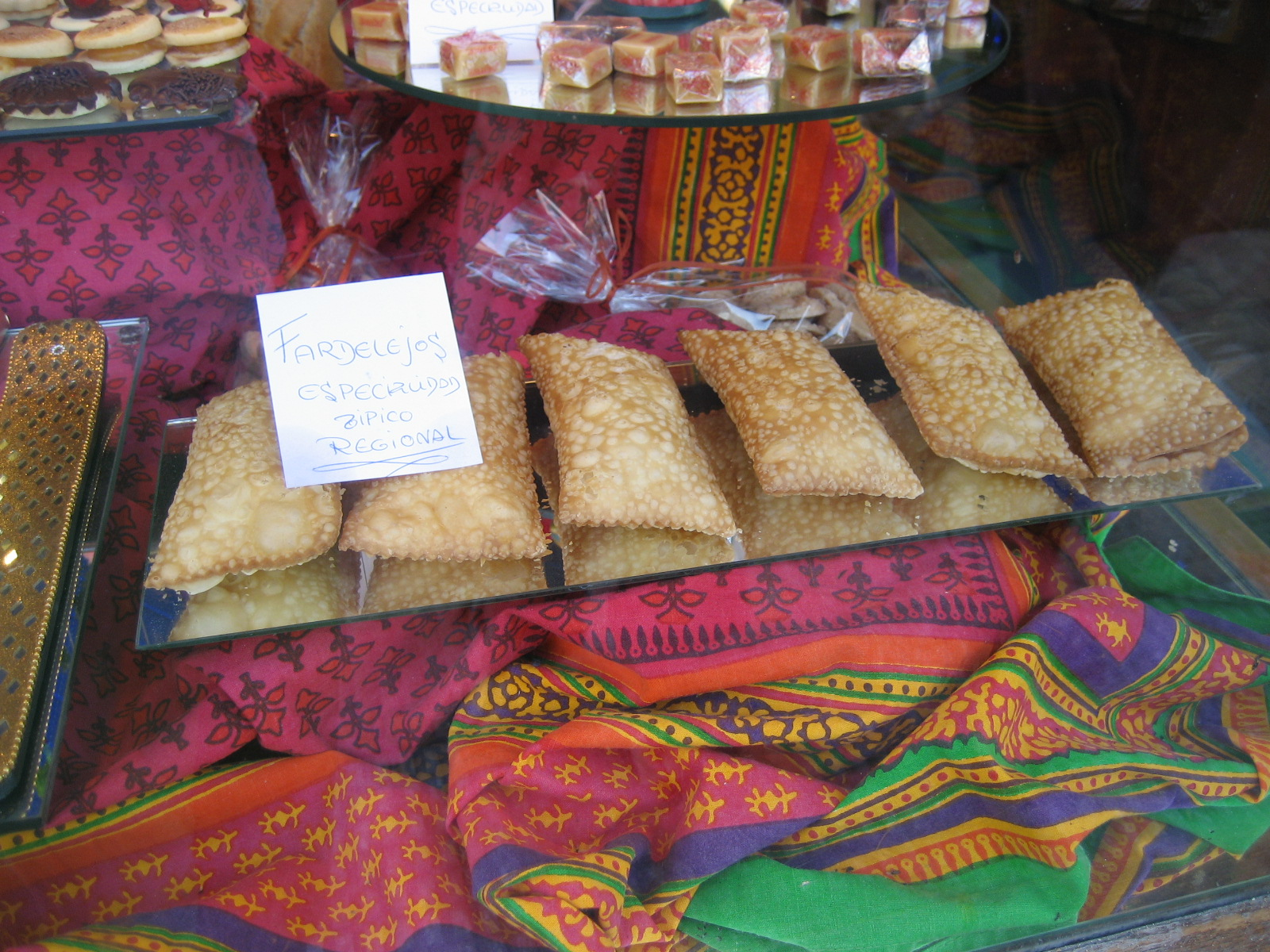 Dulce típico de la zona, lleva crema de avellana.